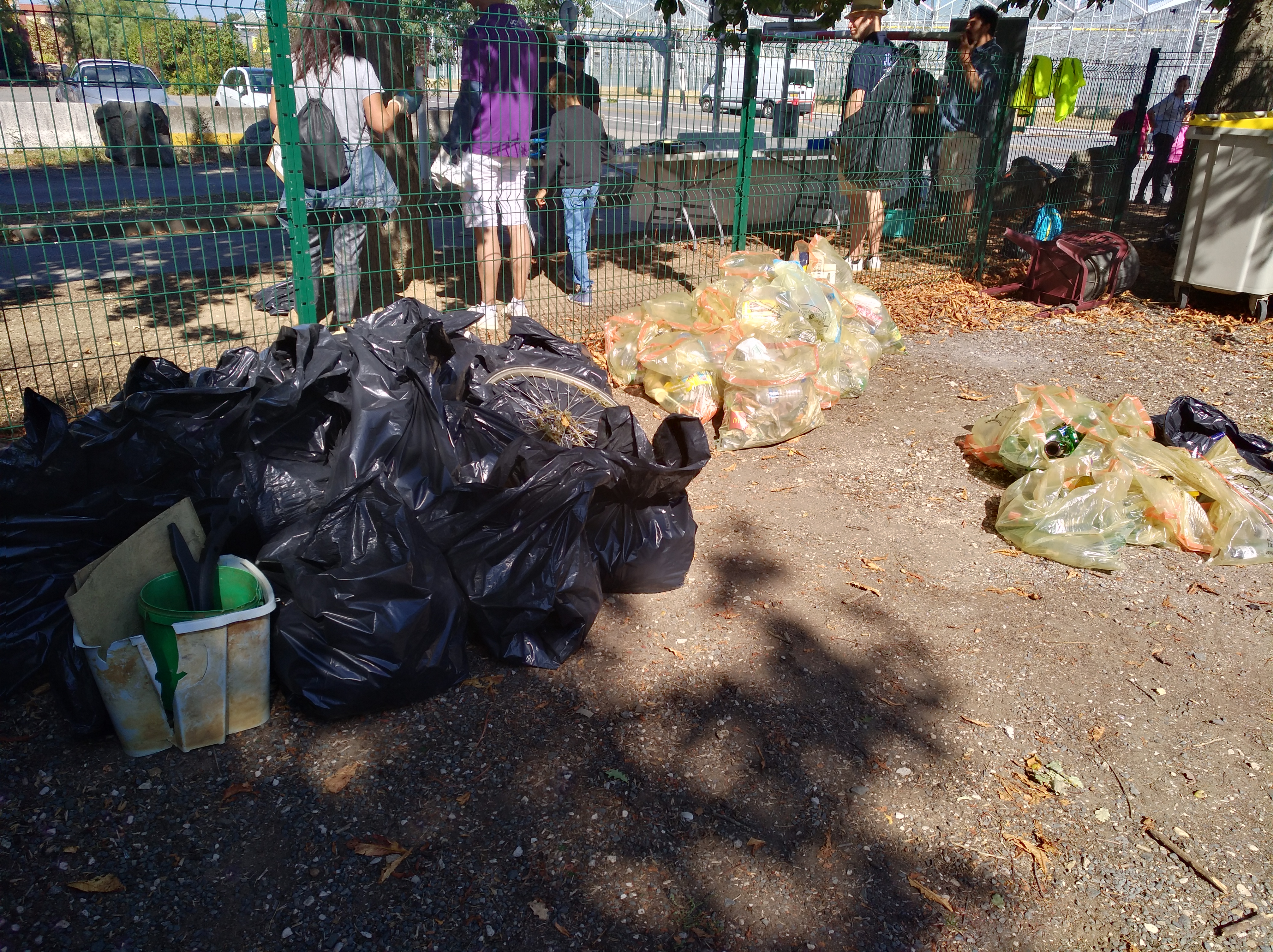 La récolte du World CleanUp Day (Let's Do It!) en 2018, autour du plan d'eau de Bordelan à Villefranche-sur-Saône (Rhône, France).